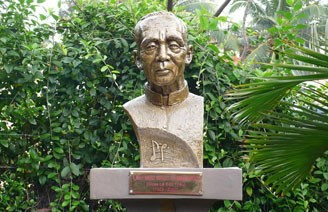 t Hoài Đức